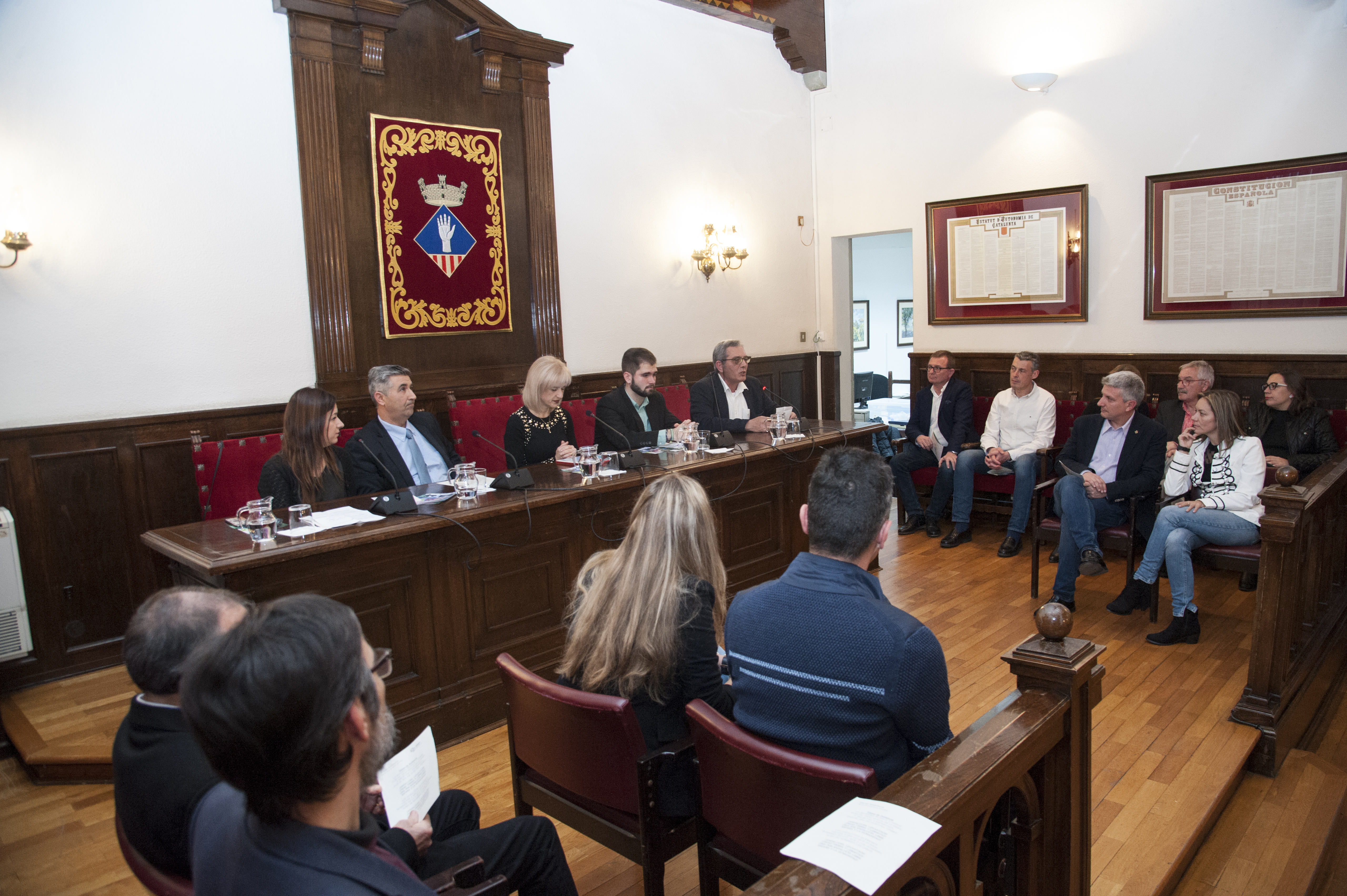 L'Andalús de l'Any 2019: Miguel Alba